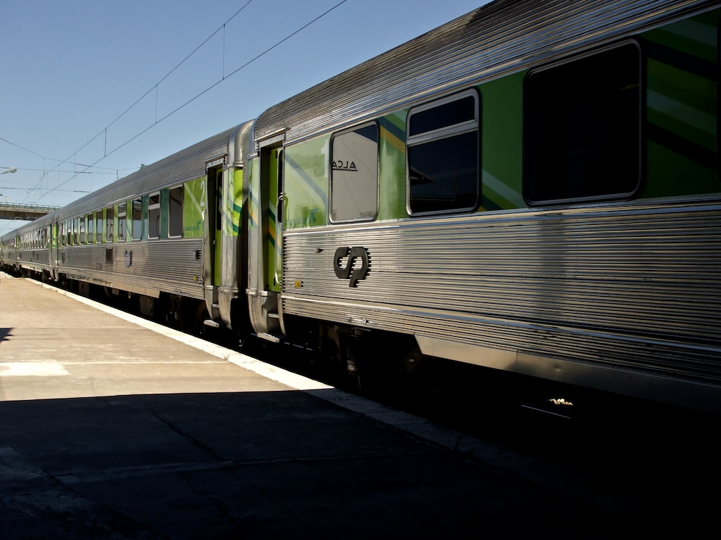 com o novo esquema de decoração (2008). Tipo: Carruagens Intercidades (transporte de passageiros) Local: Estação de Alcácer do Sal [Linha do Sul, PK 78] Data e hora: 2 de Agosto de 2008 [12h01] Material: Sorefame Renovadas